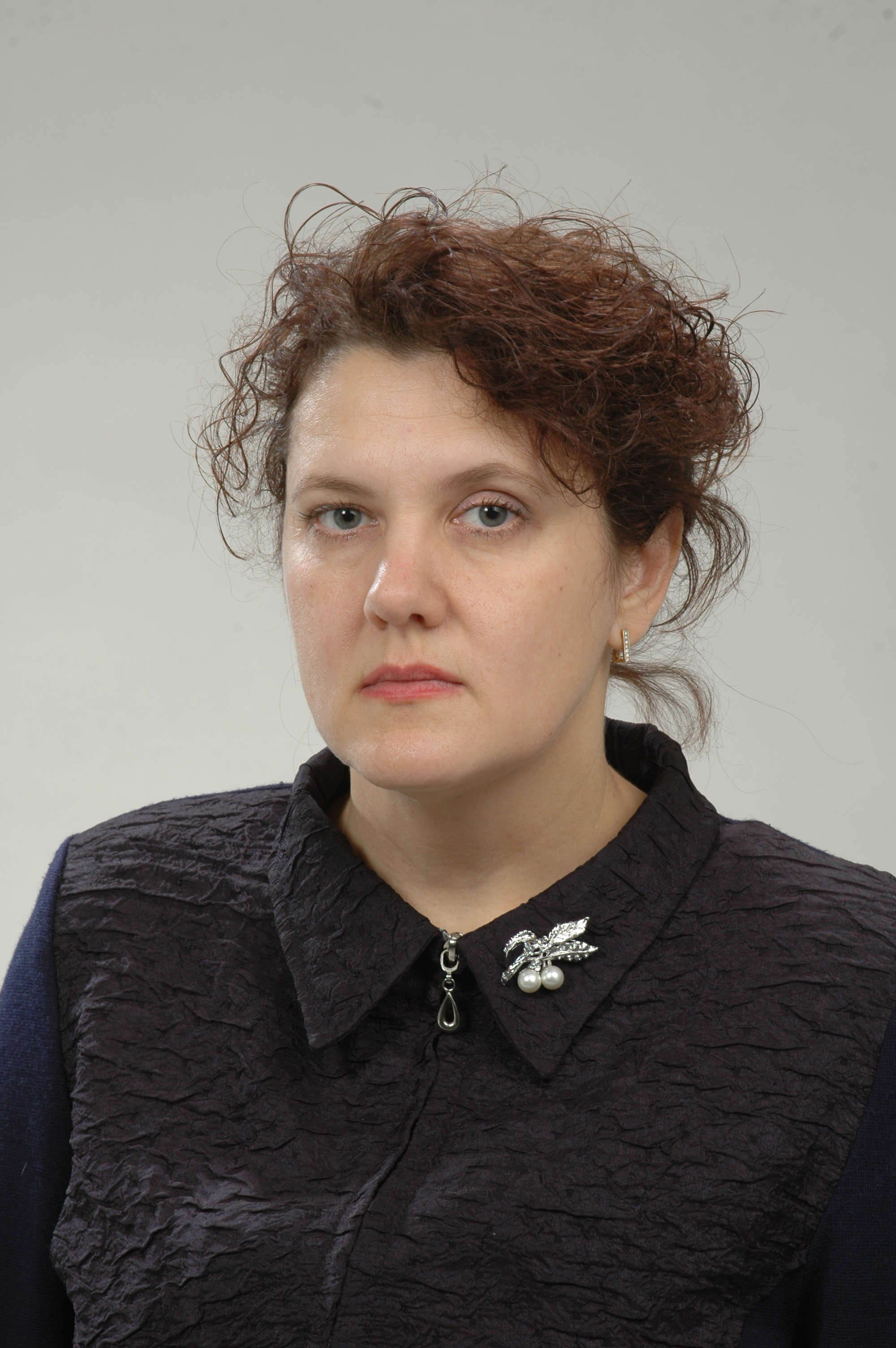 Foto: Saeima